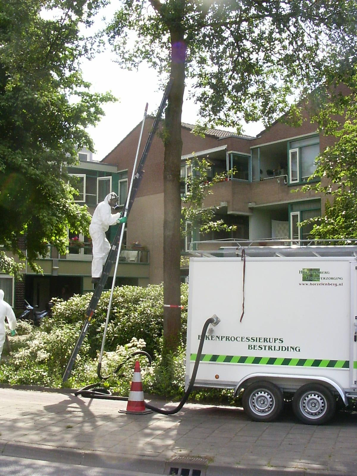 Bekämpfung von Eichenprozessionsspinnern durch Absaugen